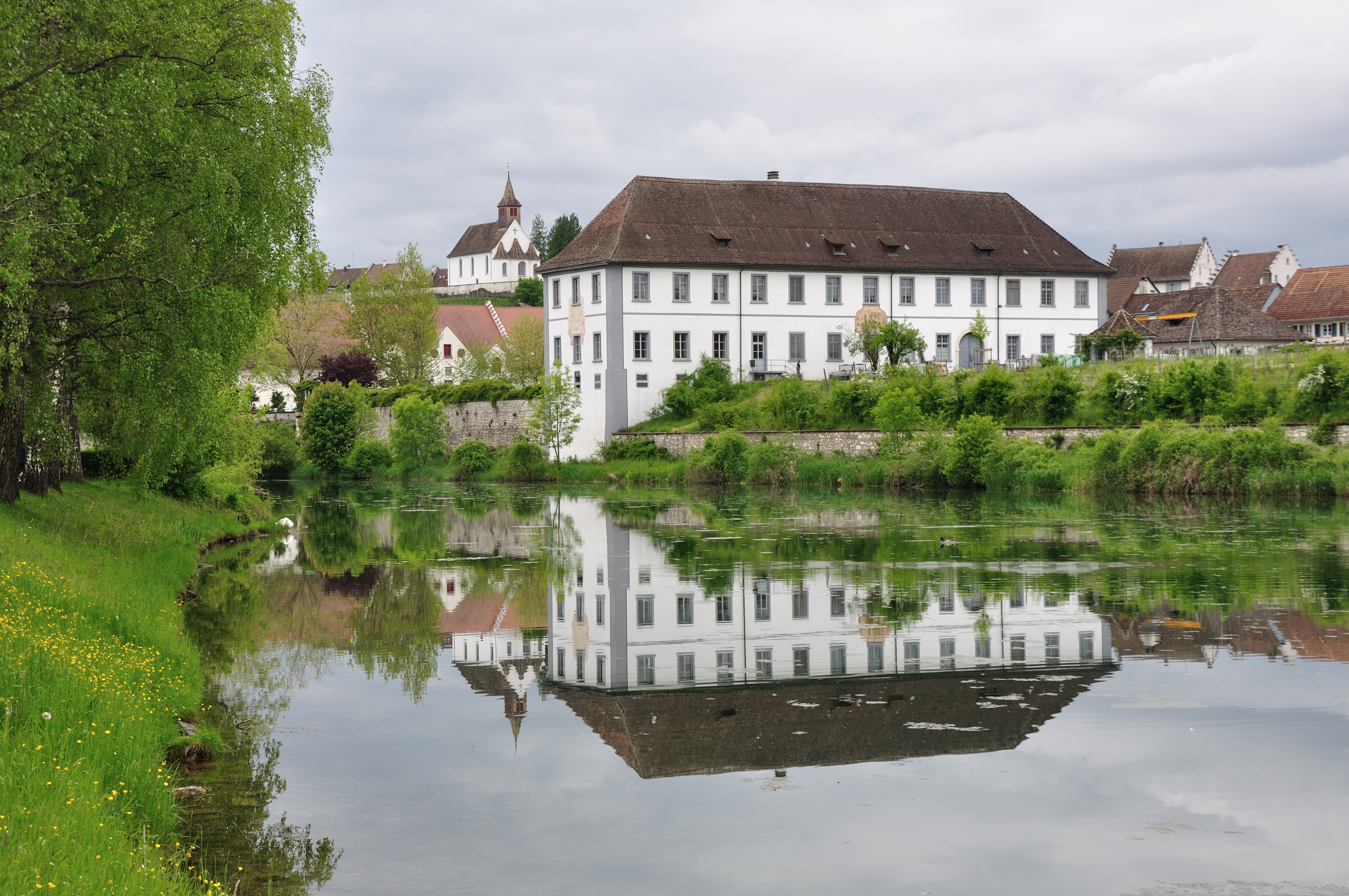 Switzerland, Canton of Zürich, Rheinau Abbey